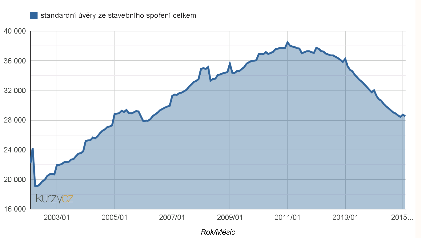 Klientské úvěry podle druhového hlediska (celkem) - CZK+CM -Standardní úvěry ze stavebního spoření celkem